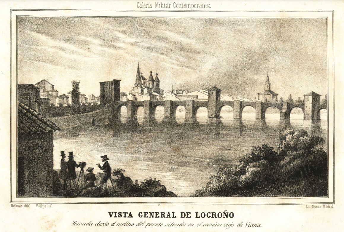 Vista general de Logroño. "Galería Militar Contemporánea". Madrid 1846